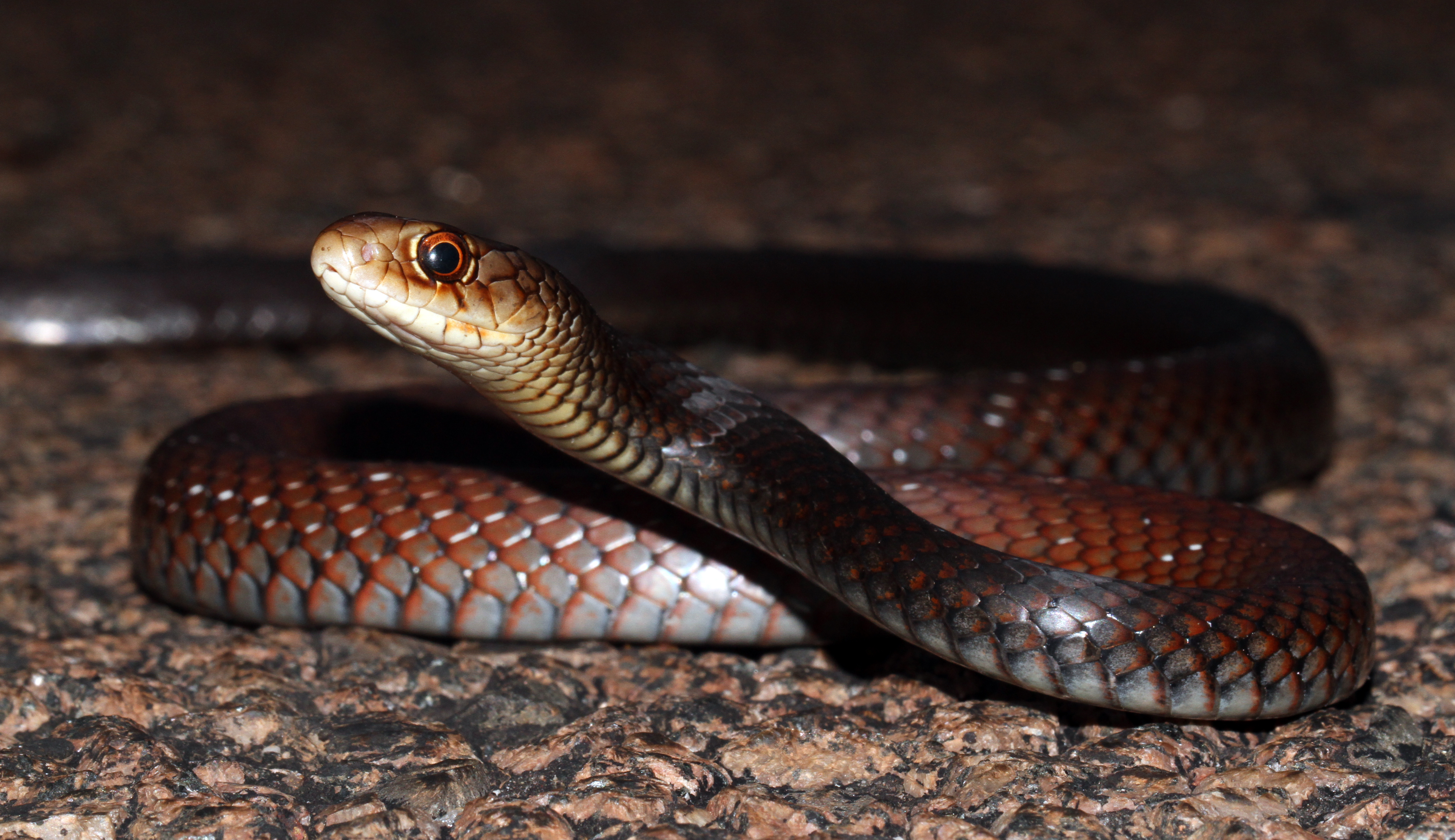 Kakadu NT.